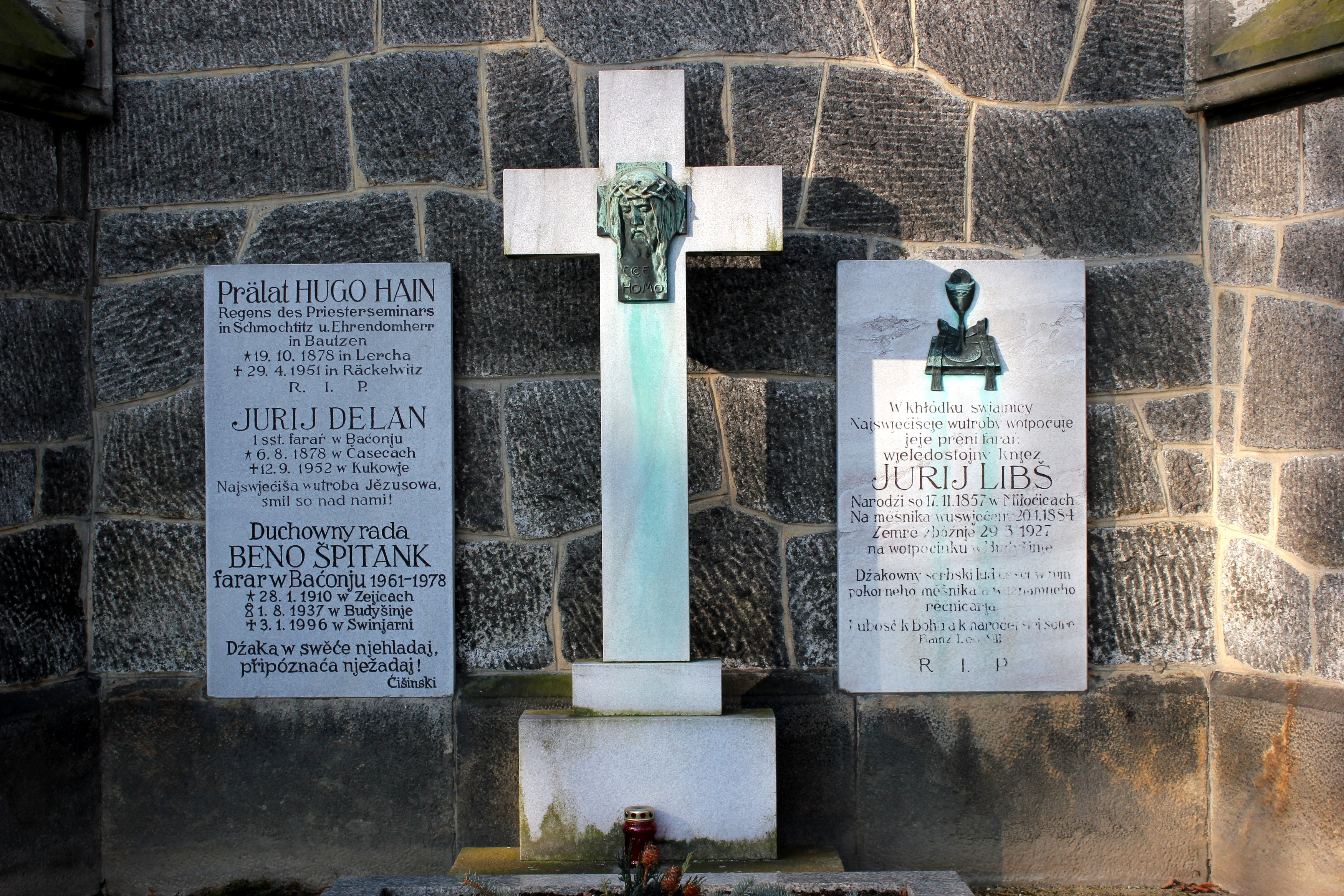 Hornjoserbsce: Narowny kamjeń Jurja Libša a Bena Špitanka při Baćońskej cyrkwi.